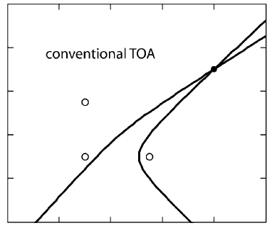 Tecnica de localizacion TOA. La Diferencia de tiempo de llegada entre pares de antenas es ilustrado por una hiperbola. La intersecion de las hiperbolas determina la localizacion de la fuente